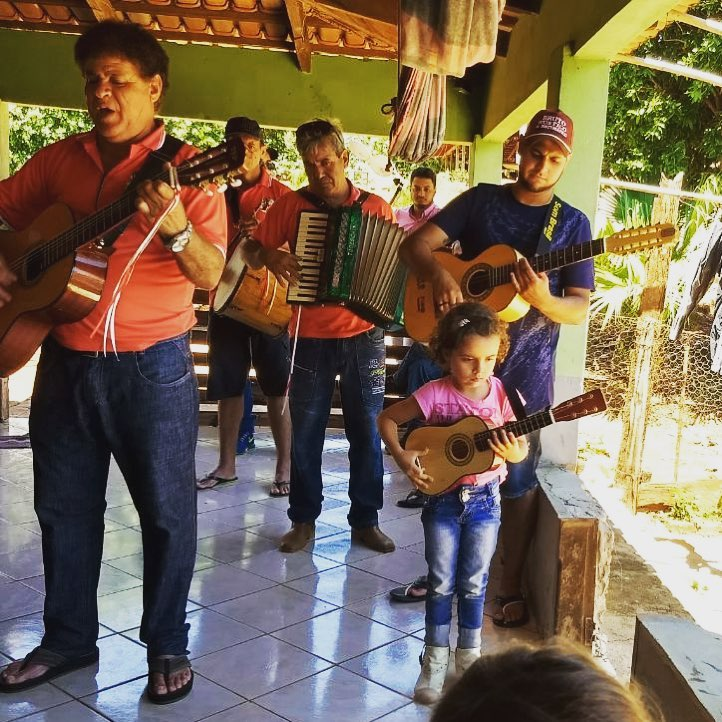 Folia de São Sebastião, Festa Cultural e Religiosa em Natinópolis - GO